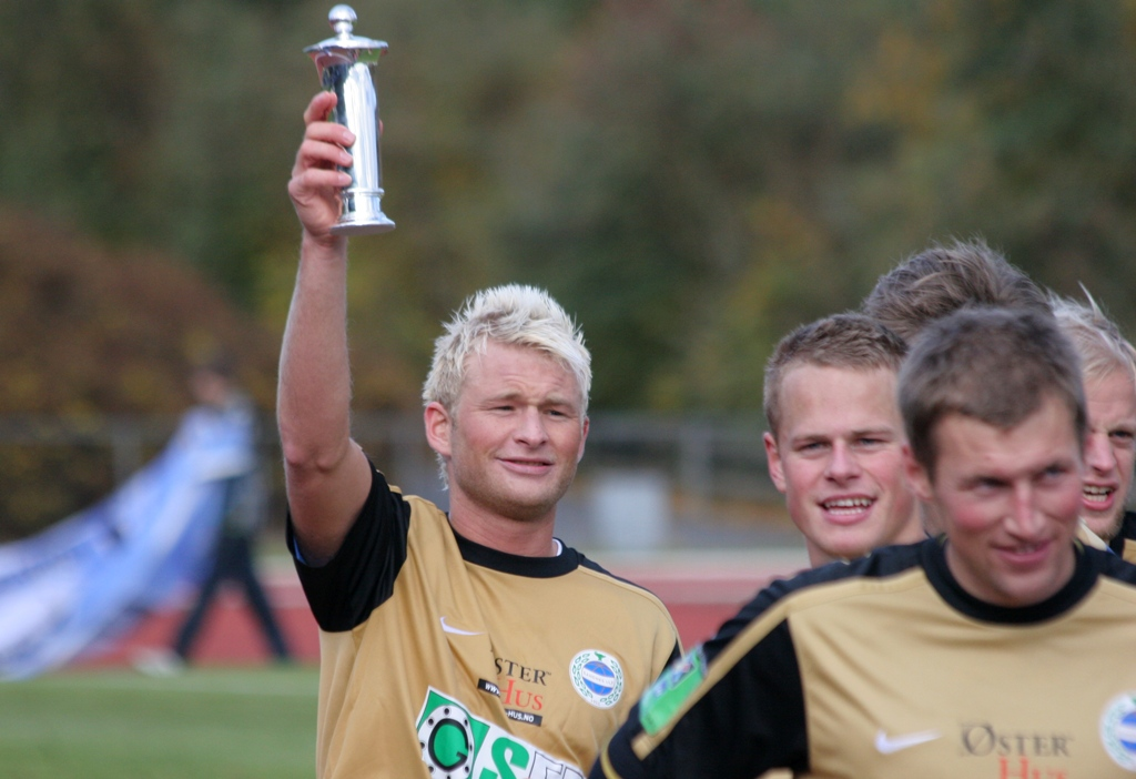 Tom Erik Maldal med pokalen som viser at Sandnes Ulf er vinnere av 2. divisjon avdeling 3 2009